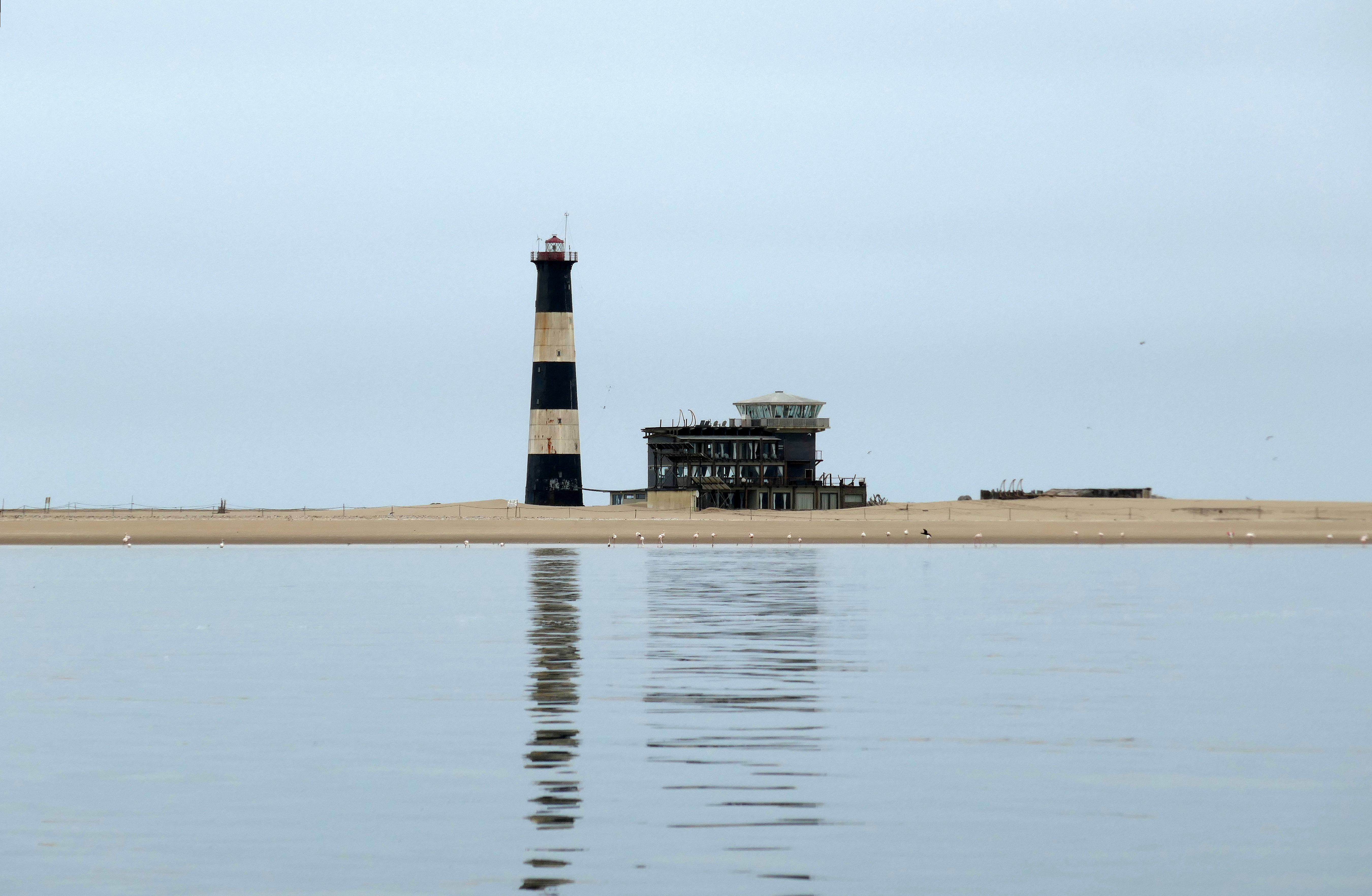 Walvis Bay (Namibie) : le phare de Pelican Point.